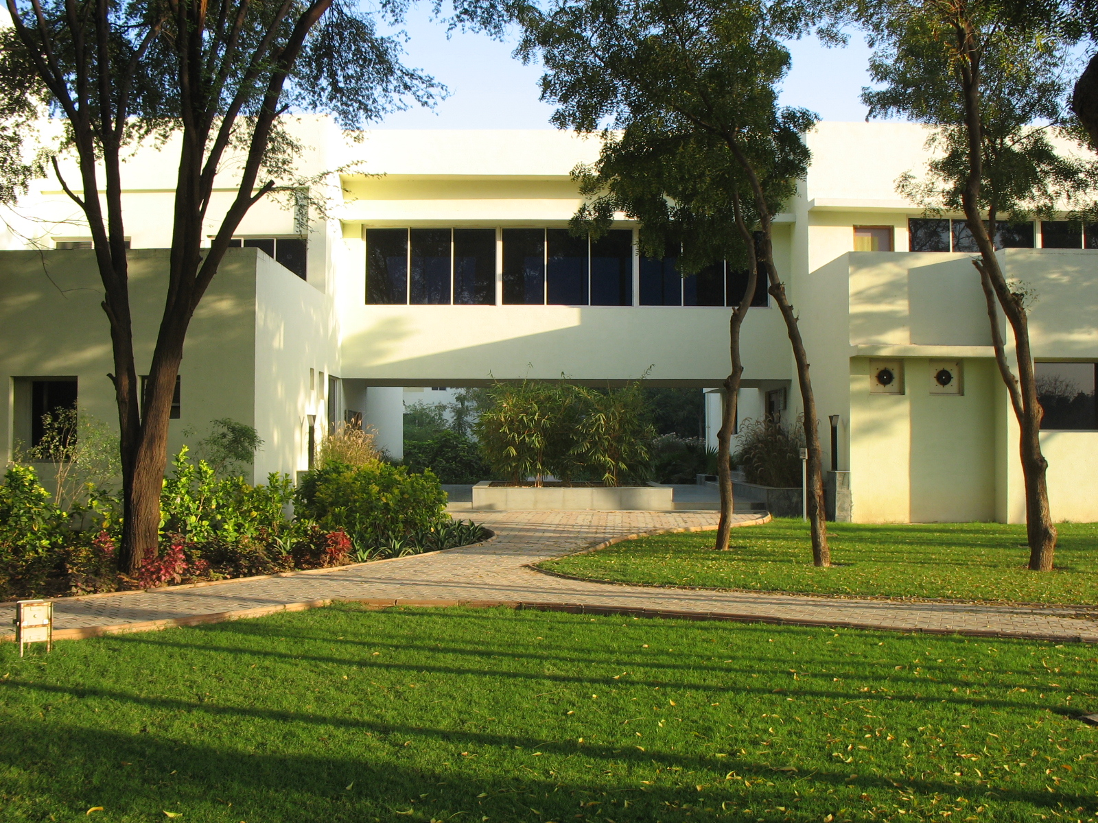 Resource Centre, DA-IICT